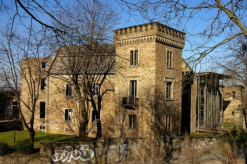 Witten-Mitte, Haus Witten, Seitenansicht. Vom Stadtpark aus betrachtet, über die Ruhrstraße hinweg fotografiert.